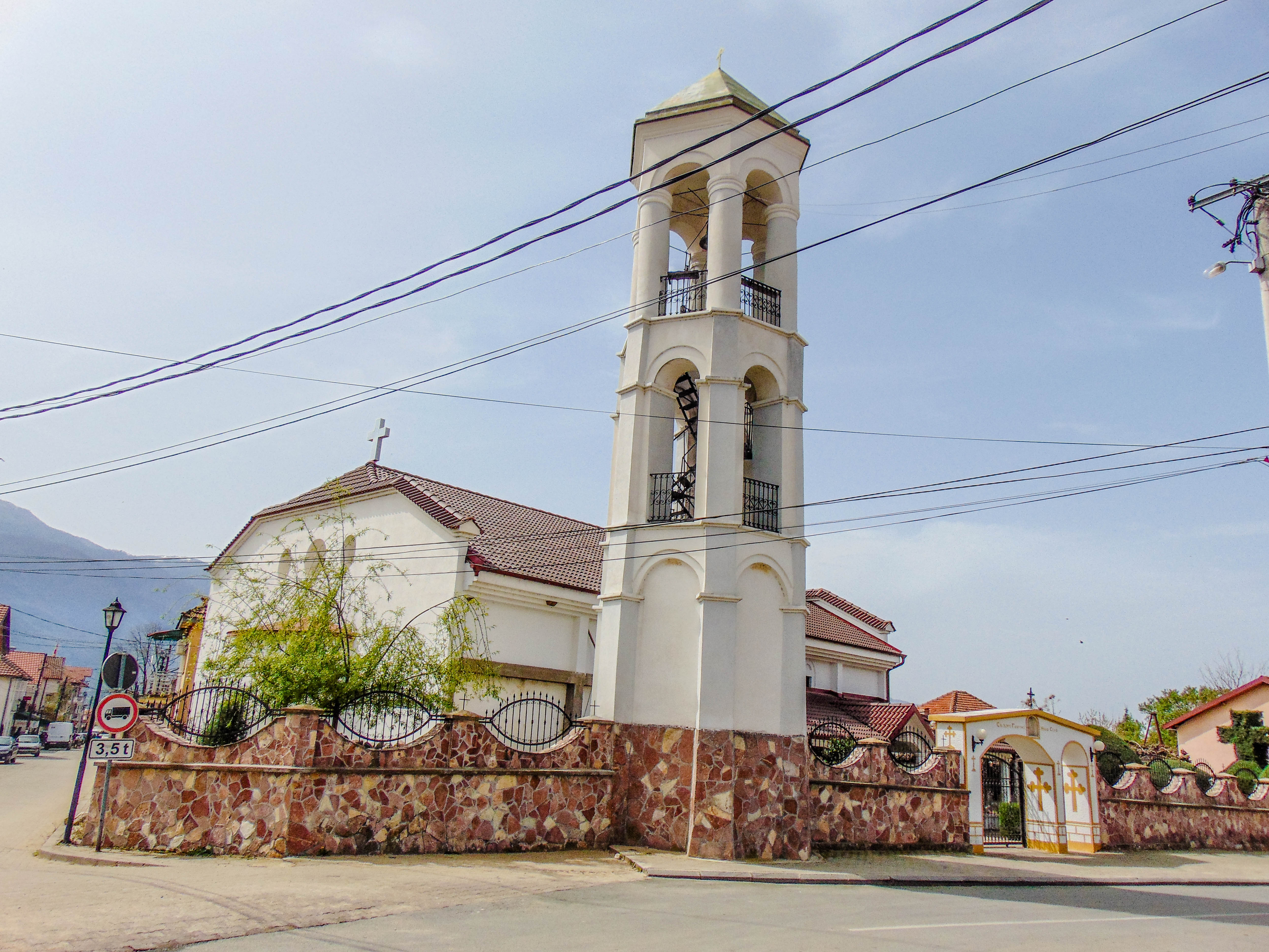 Црква „Св. Ѓорѓи“ - Ново Село